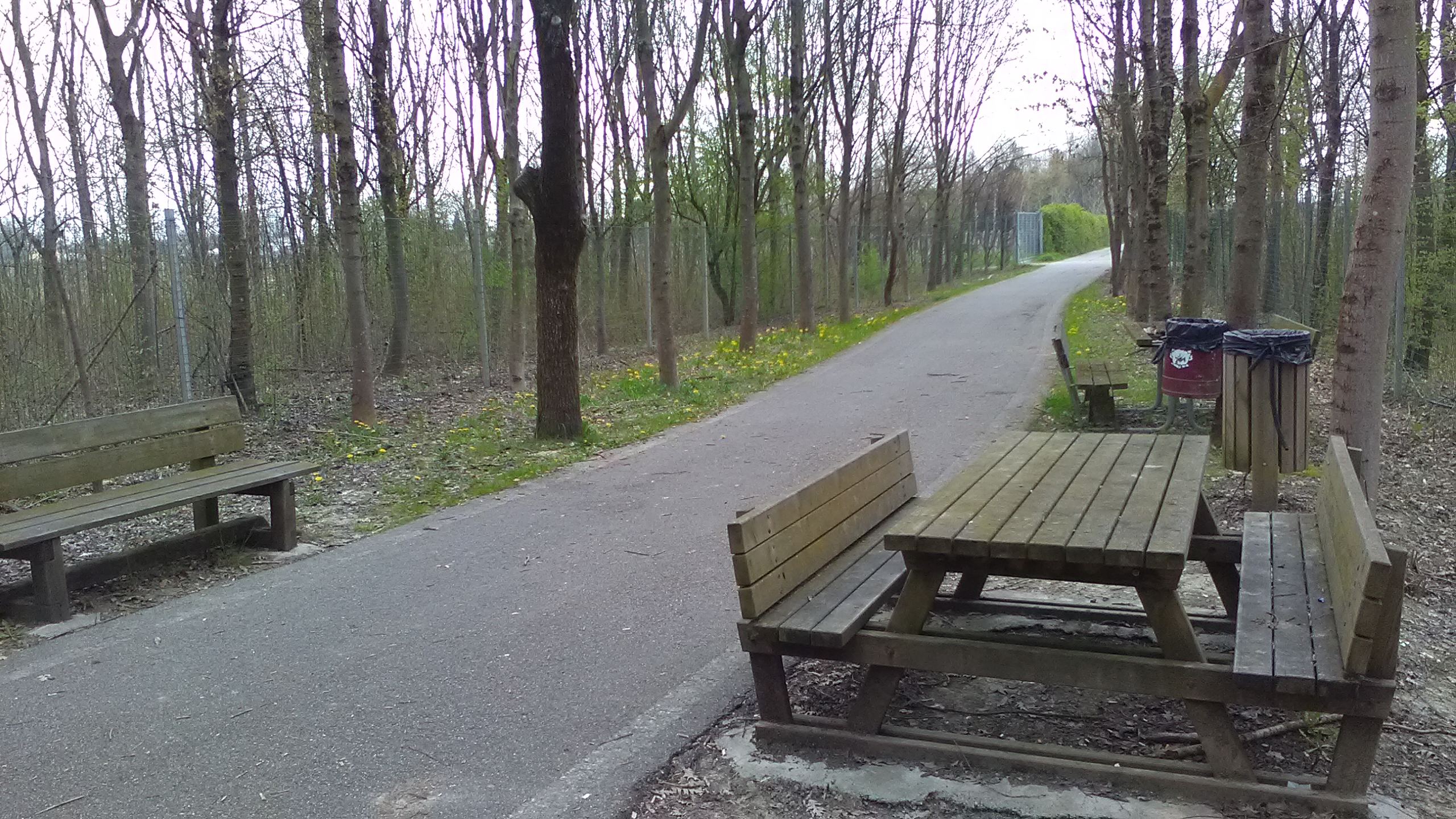 Area attrezzata sulla pista ciclabile realizzata a Medolla sul traciato della ex diramazione ferroviaria Cavezzo-Finale Emilia (Ferrovia Modena-Mirandola)